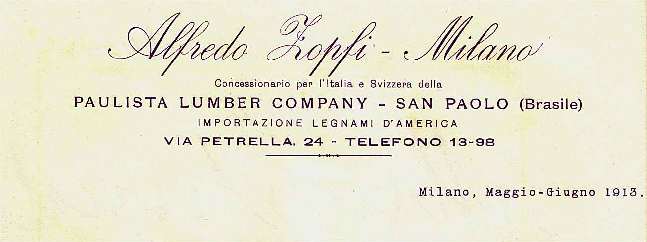 Carta intestata Alfredo Zopfi Milano concessionario per l'Italia e la Svizzera della Paulista Lumber Company - San Paolo (Brasile) importazione legnami d'America